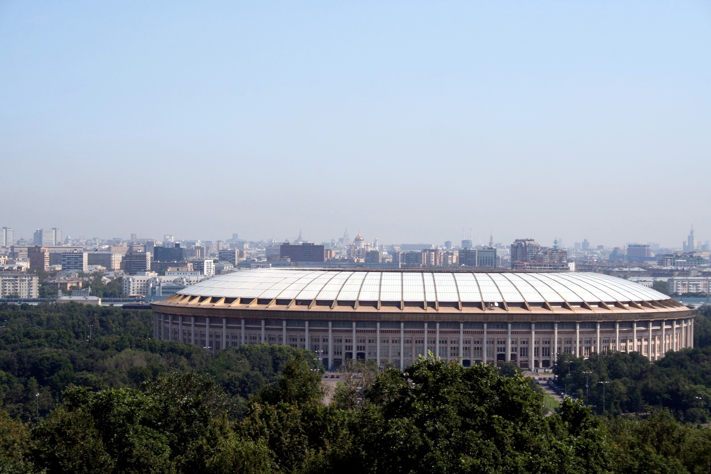 Luzhniki Stadium